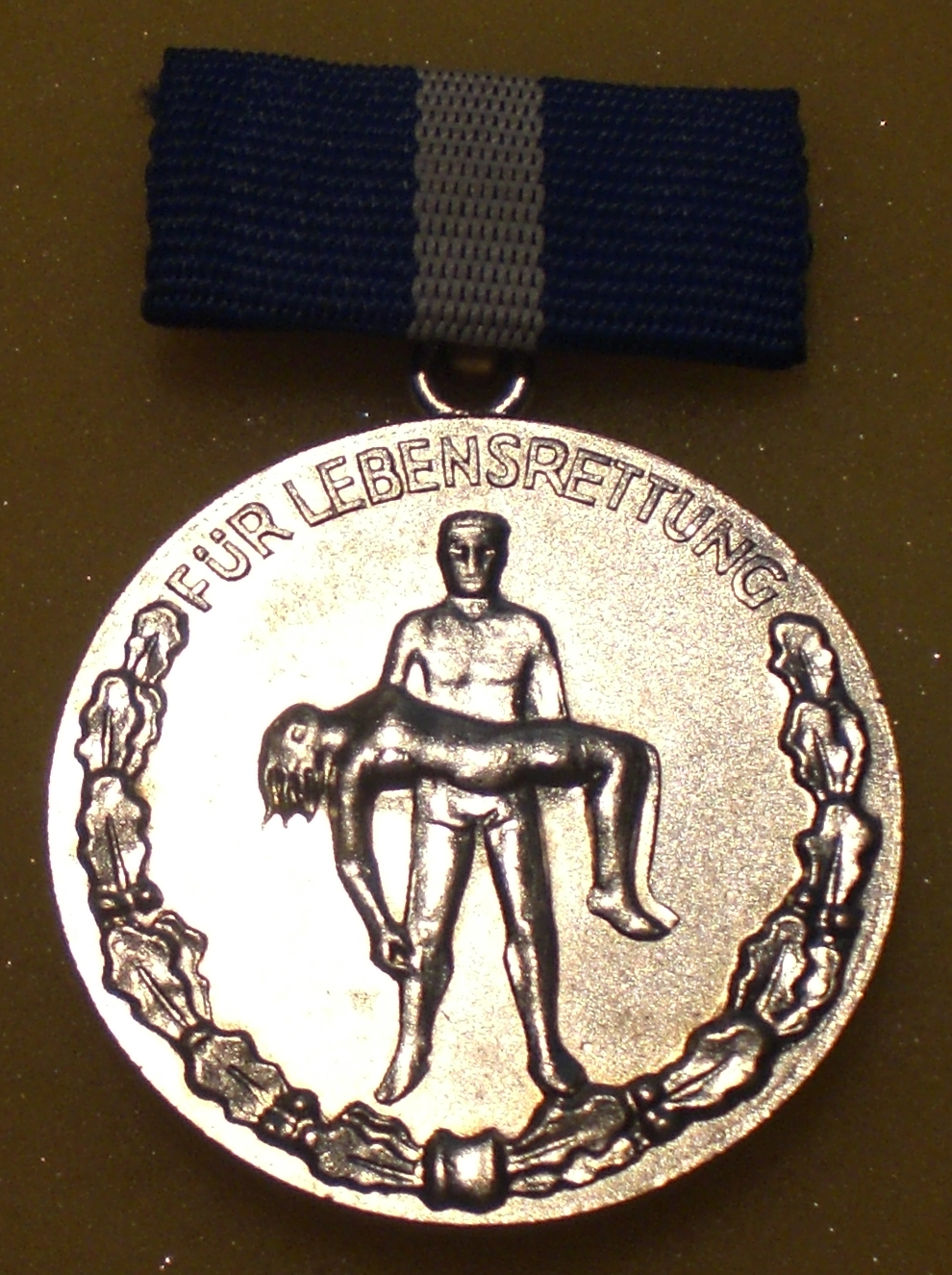 Avers der Lebensrettungsmedaille der DDR in der zweiten Form